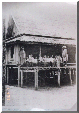 หอโฮงหรือเรือนเจ้าเมือง ใช้เป็นที่ว่าราชการงานเมืองในสมัยนั้น